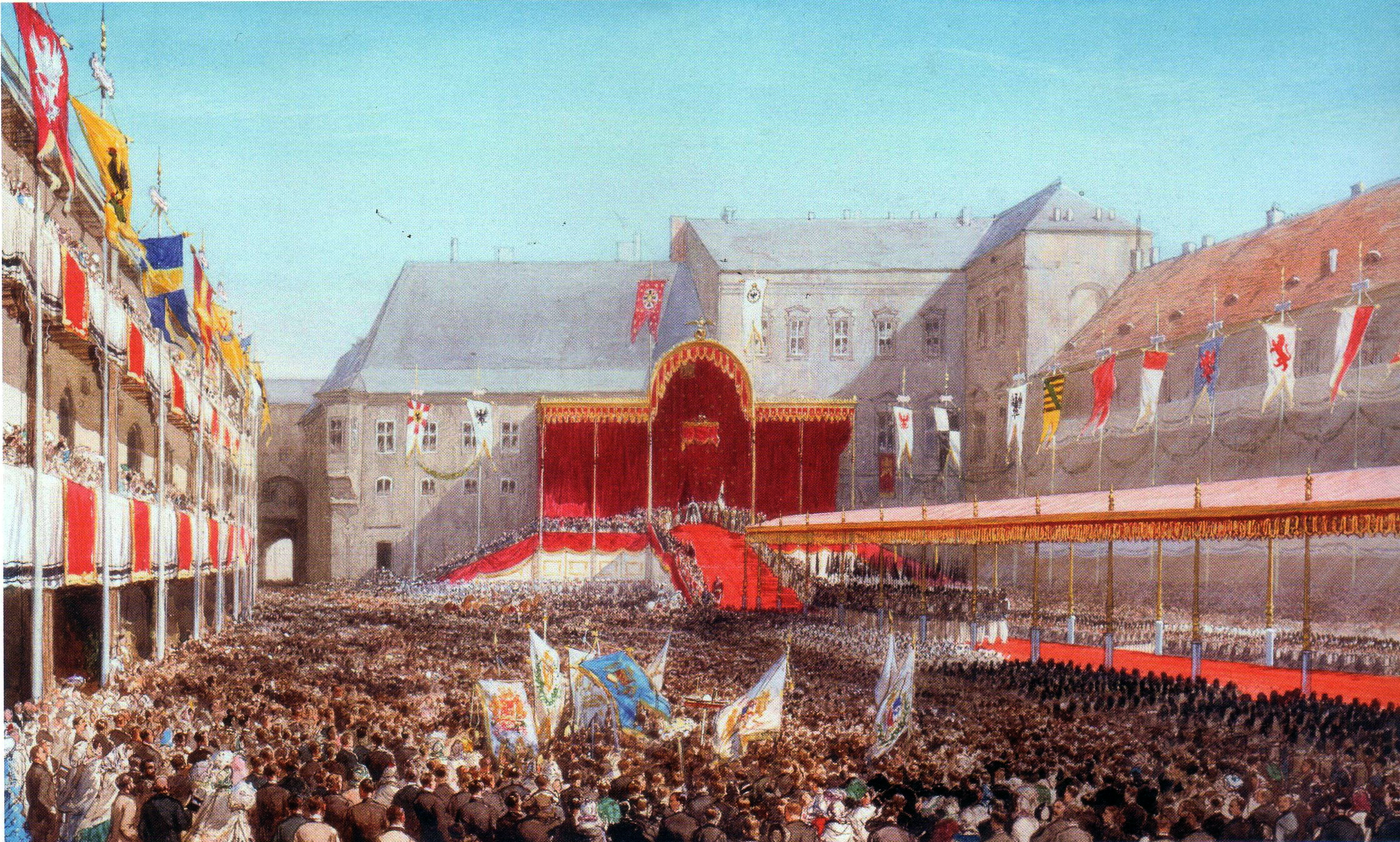 Krönungszug für König Wilhelm I. von Preußen auf dem Königsberger Schlosshof am 18. Oktober 1861